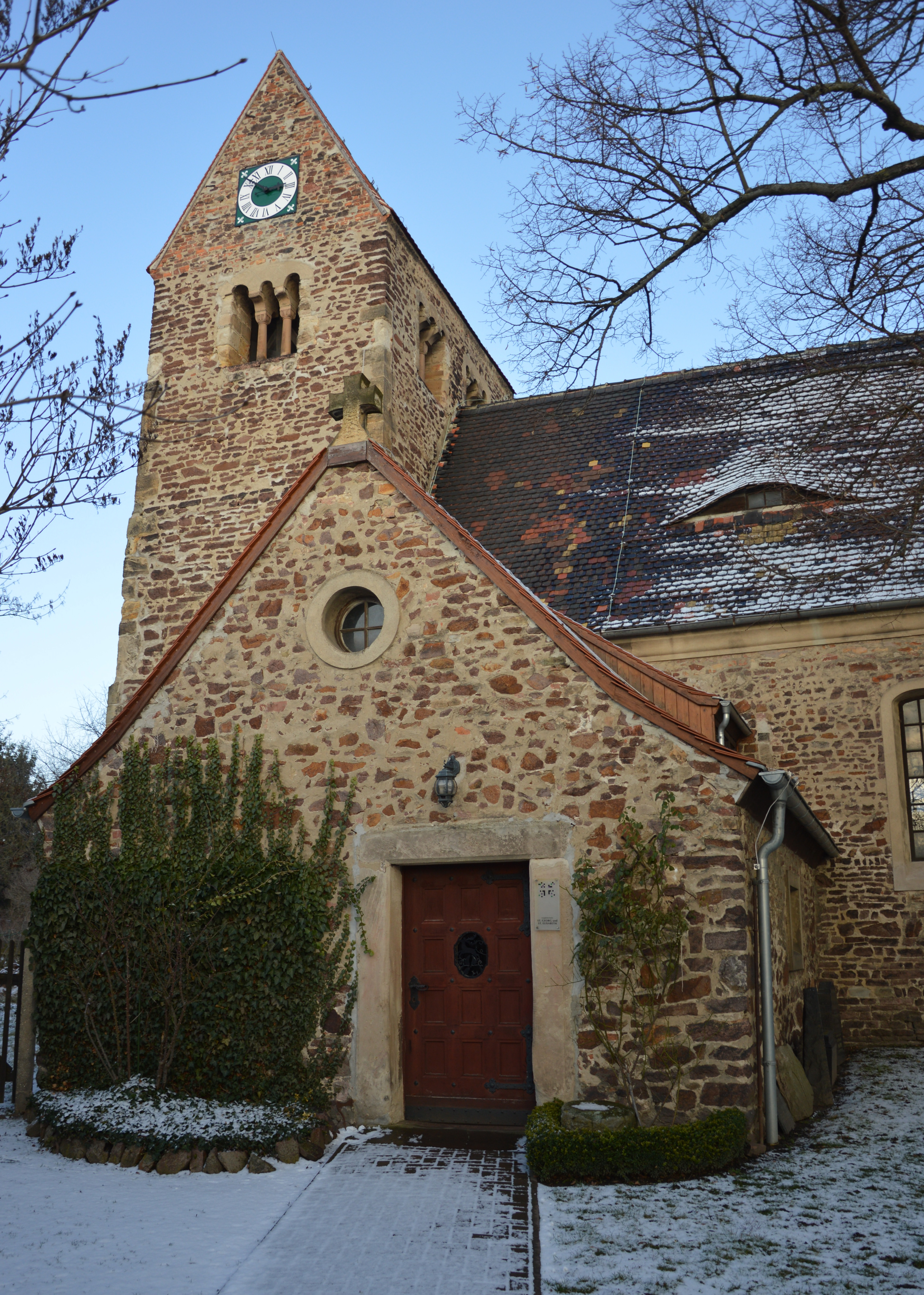 Kirche Oppin